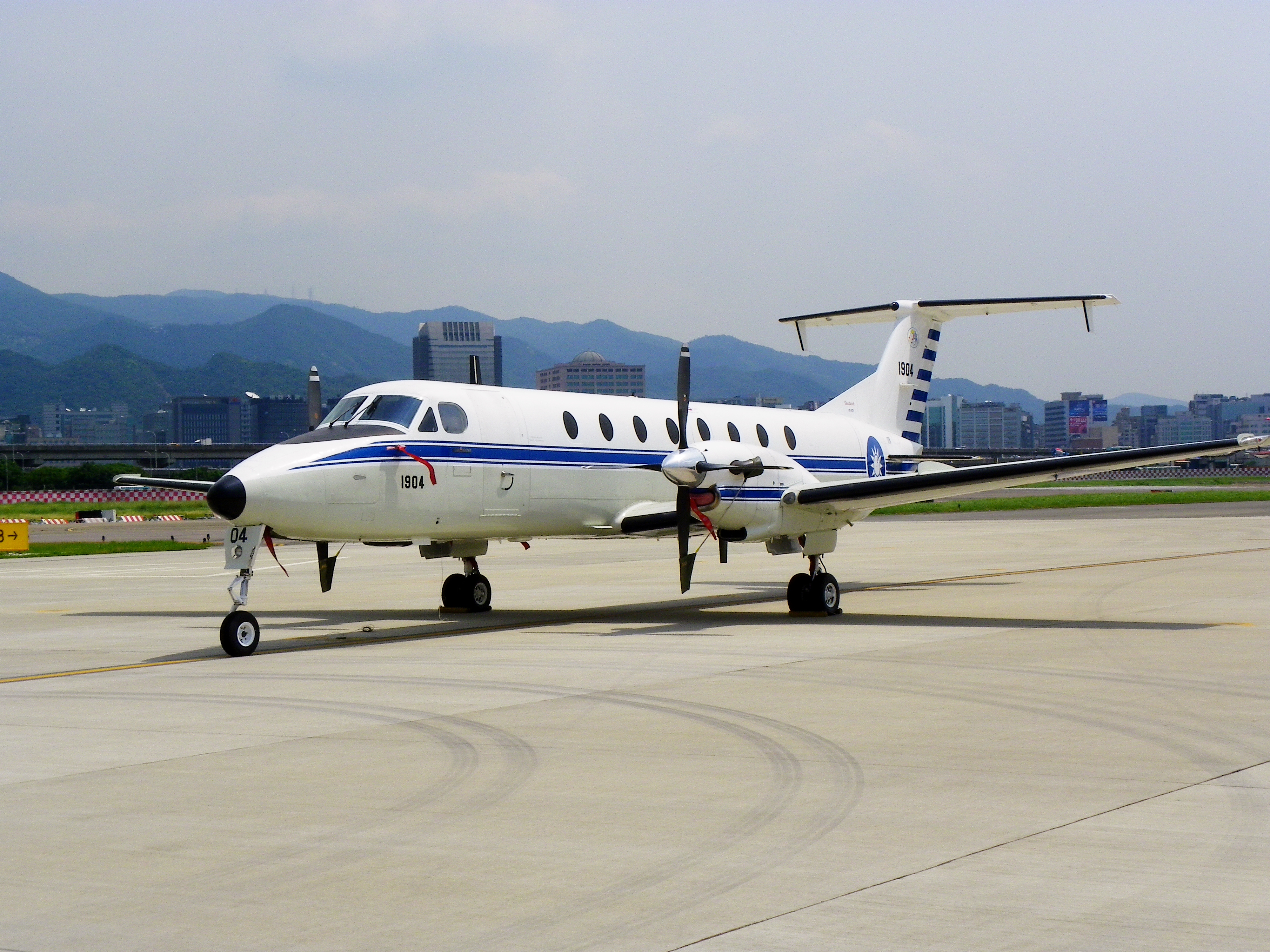 空軍松山基地的畢琪1900C行政專機。